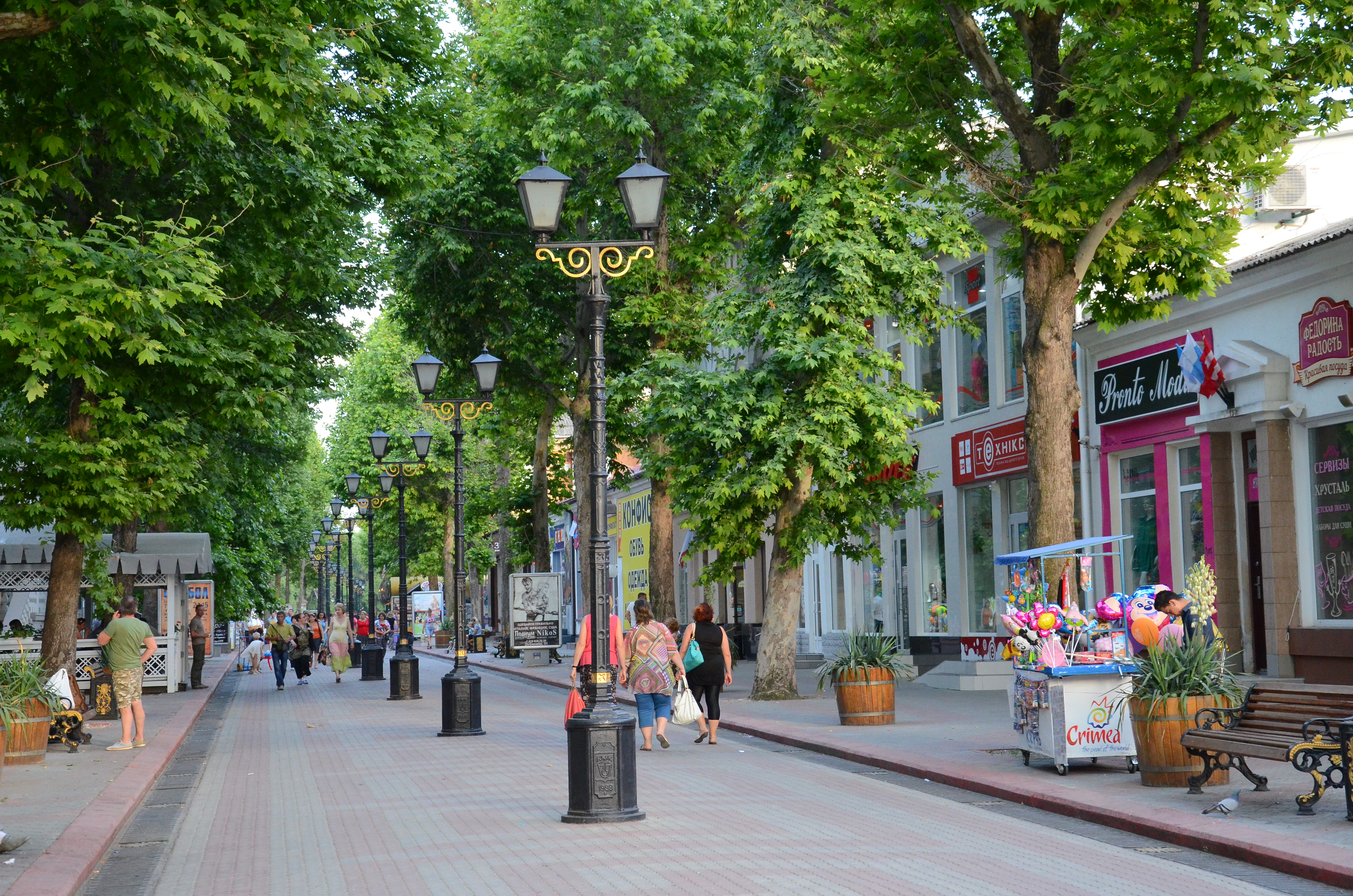 Керчь